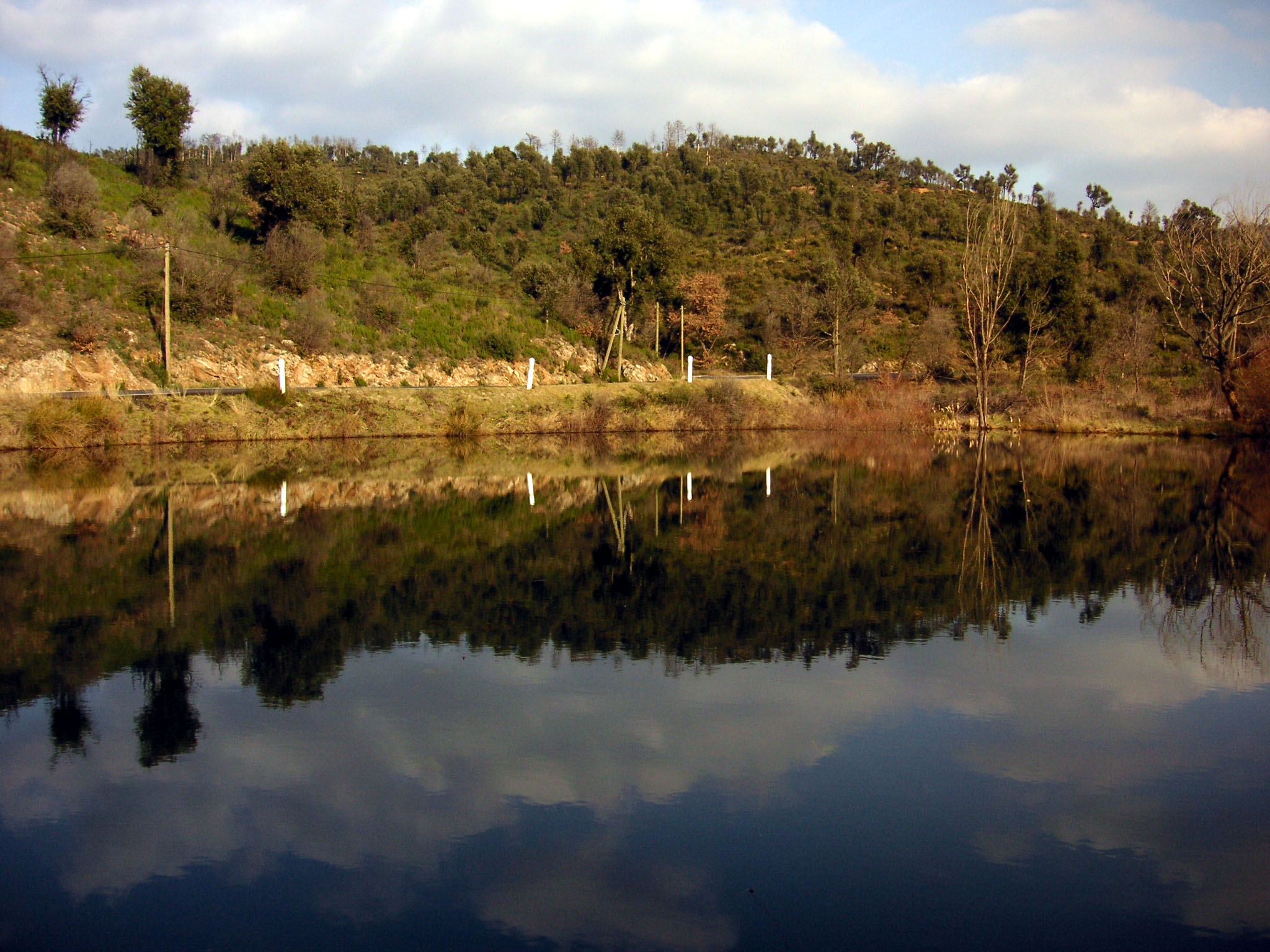 Rivière grossie par une retenue d'eau le long d'une route en France, près du Plan de la Tour et Vidauban dans le massif des Maures (Var, 83).